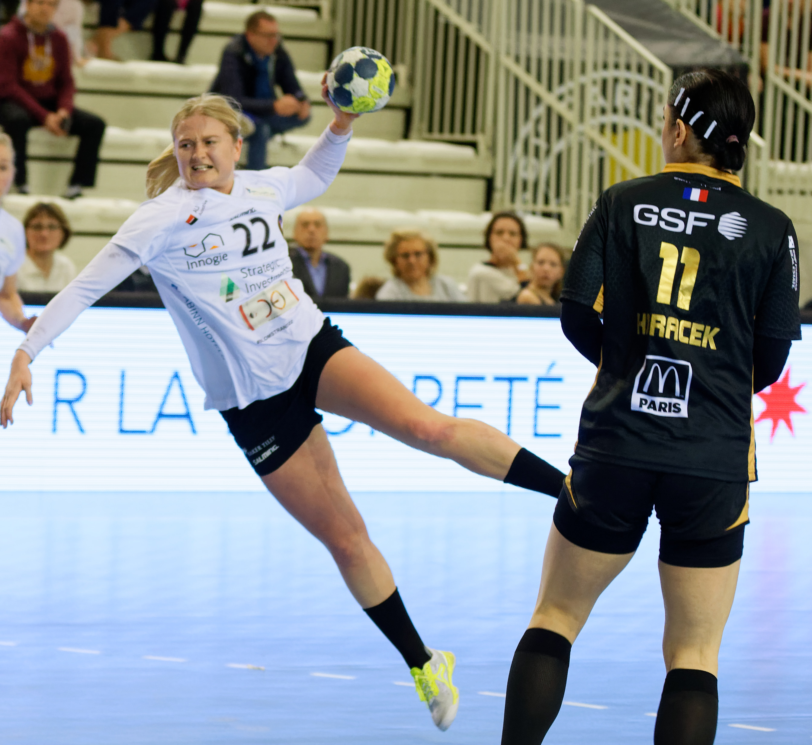 Rencontre du tour principal de la coupe EHF entre Issy Paris Hand et les danoises de Copenhague. A Issy Les Moulineaux, le 28 janvier 2018.